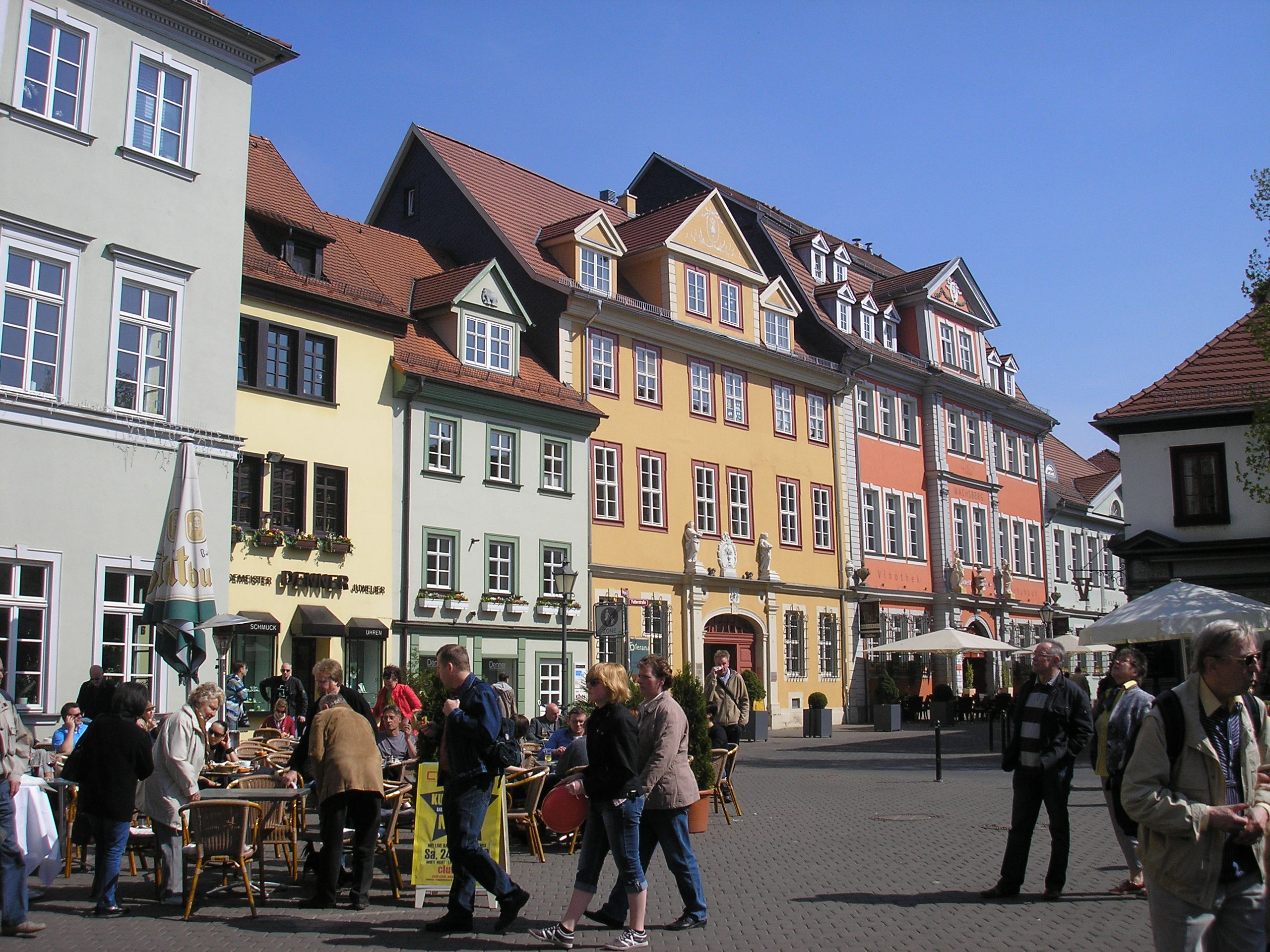 Häuser am Wenigemarkt (Nordseite) in Erfurt.